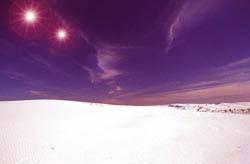 Simulata hipoteza pejzaĝo sur iu planedo kun la duopa stelo Alfa Centaŭro A kaj B en la ĉielo